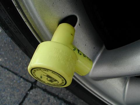 Wegfahrsperre.